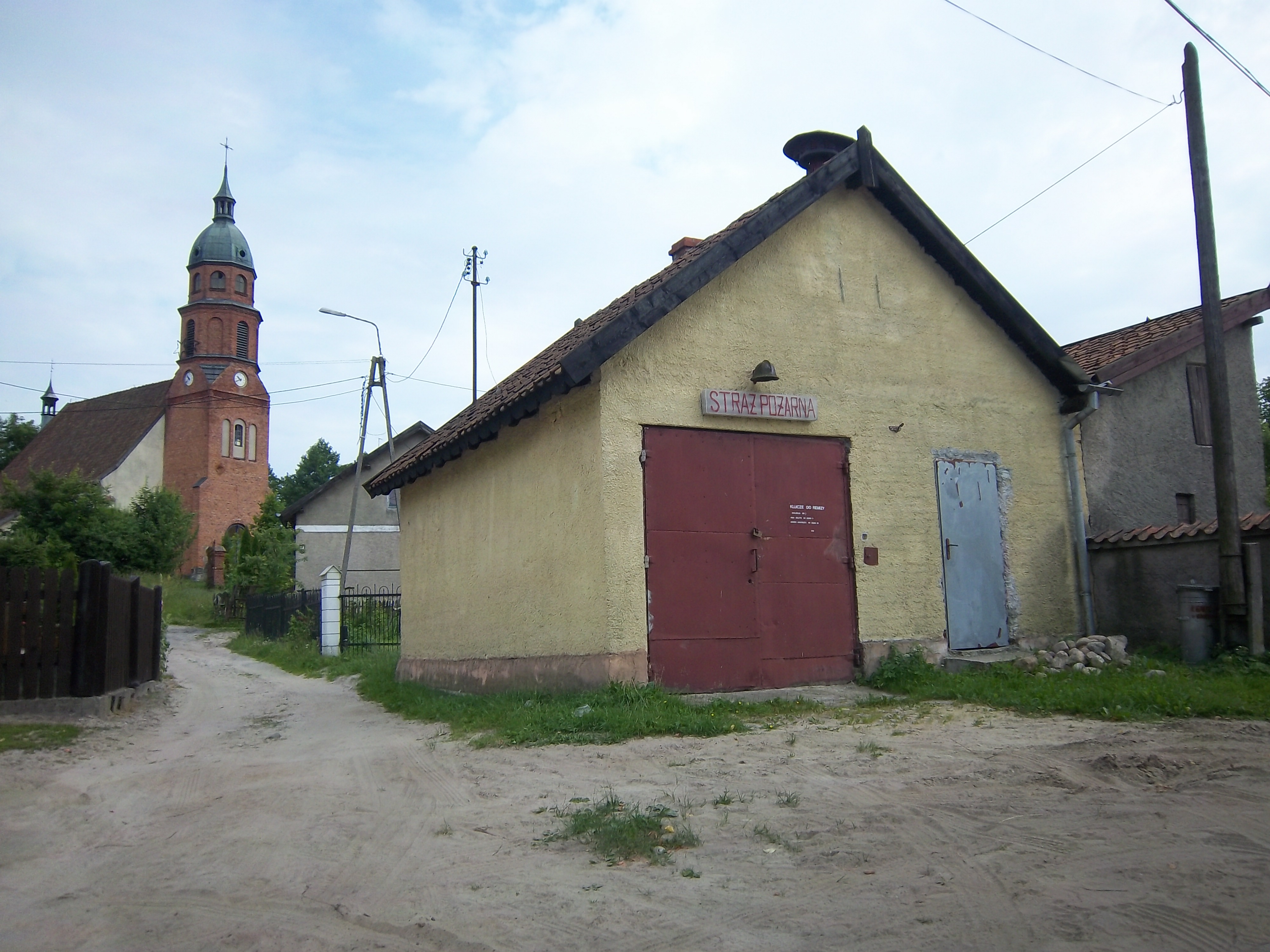 OSP w Bartołtach Wielkich, w głębi kościół p.w. św. Jakuba